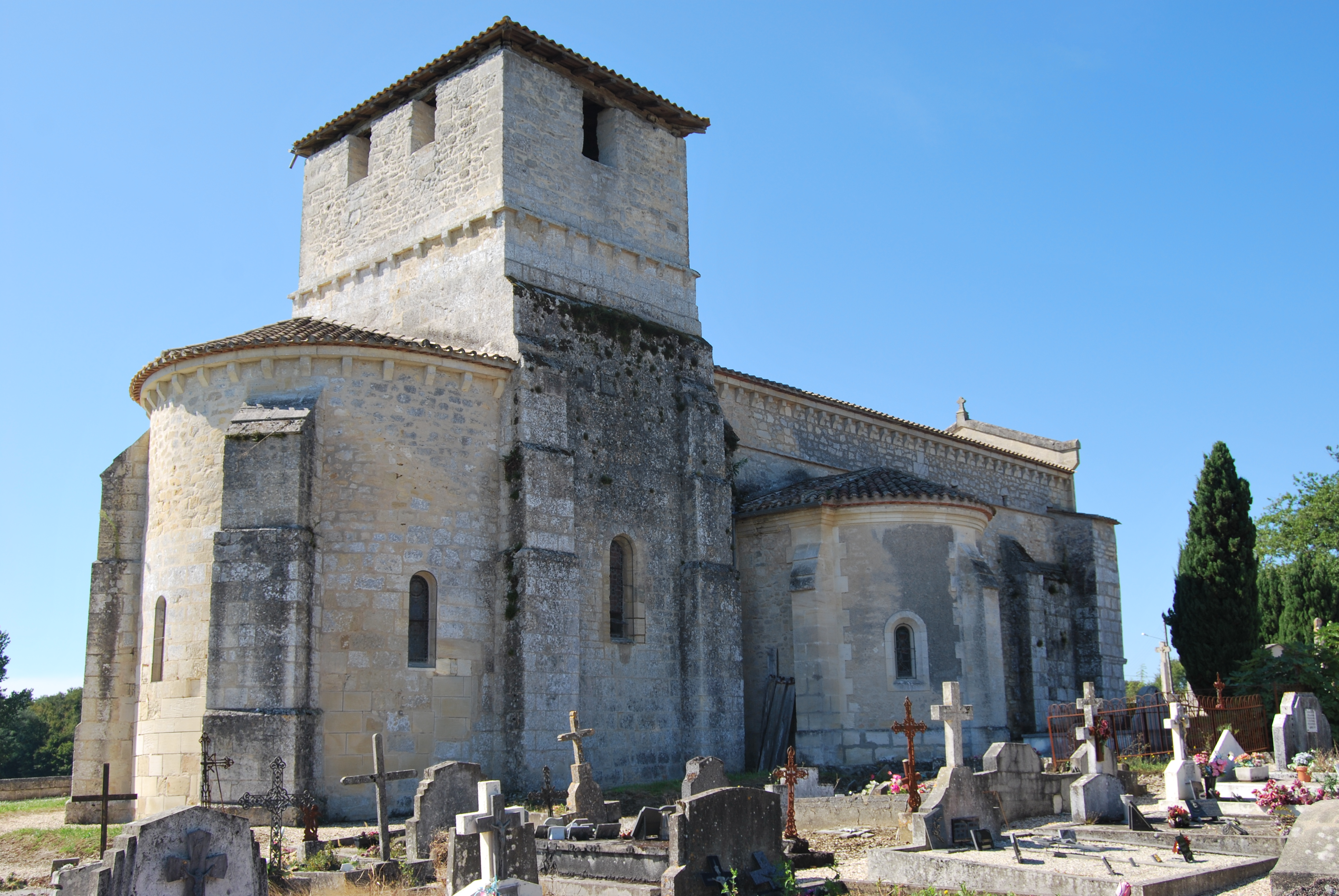 Église de Saint-Martin-de-Laye .